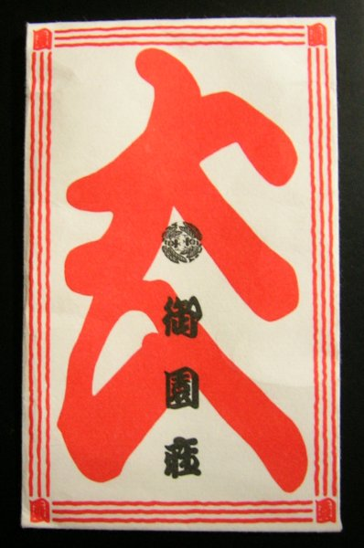 Ōiri bukuro. 御園座の大入り袋